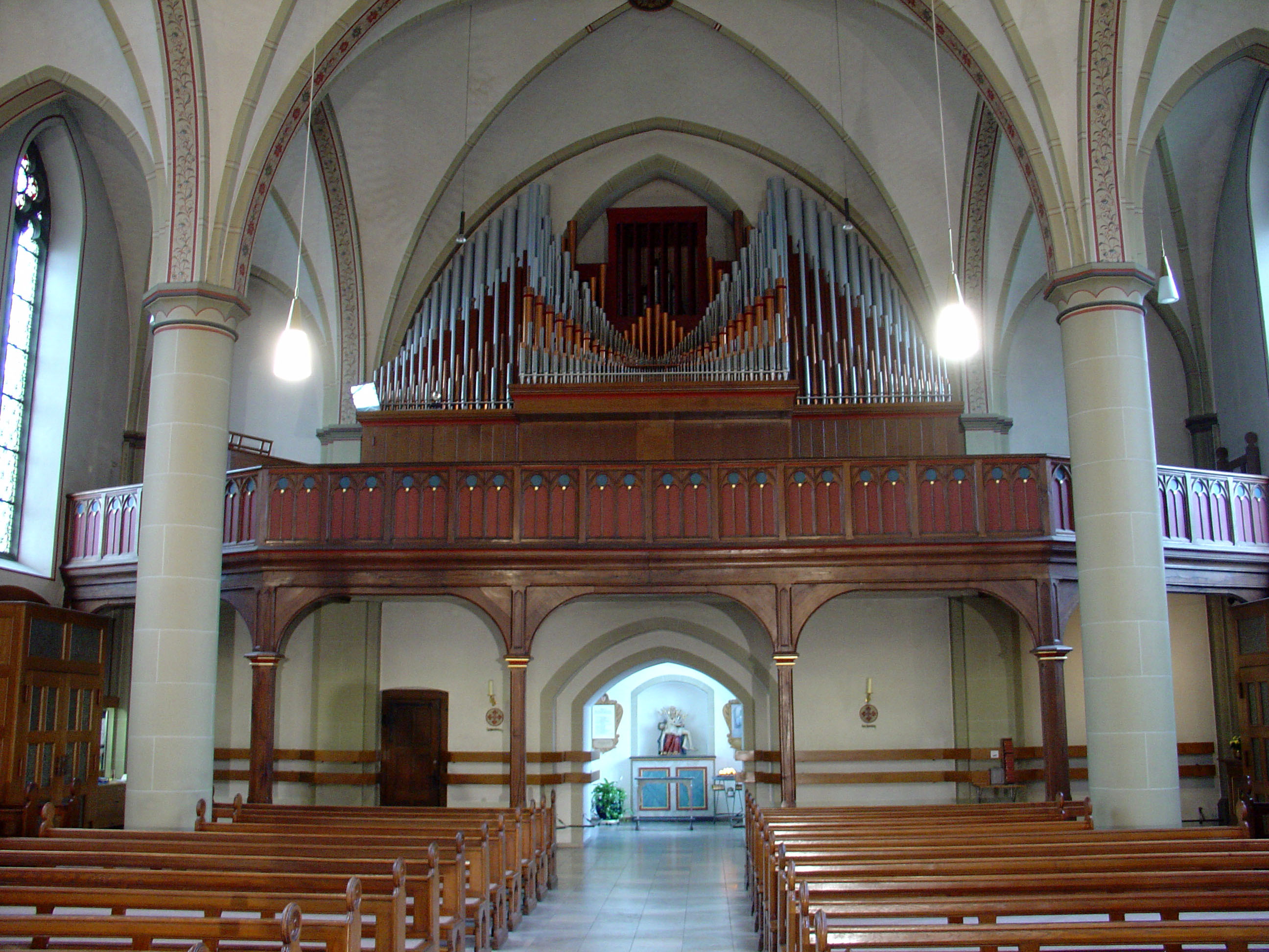 Orgelempore in St. Joseph in Delbrück-Westenholz